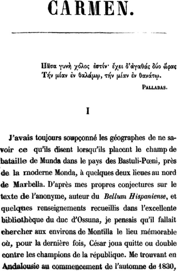 First page of Carmen (1845) by Prosper Mérimée (1803-1870)